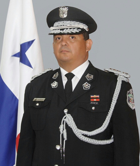 Fotografía oficial del Comisionado Omar Pinzón como Director General de la Policía Nacional de Panamá